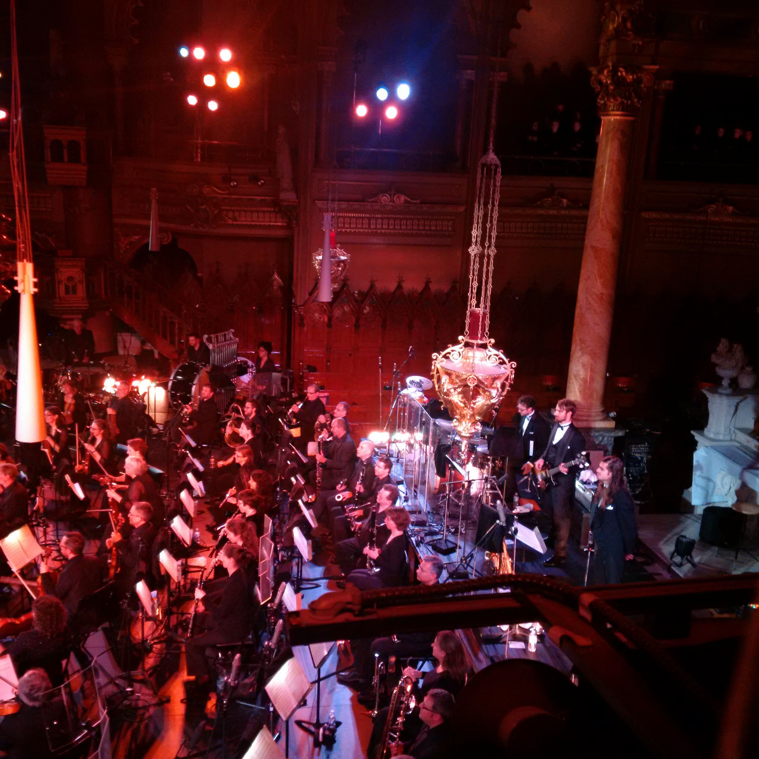 Le groupe électro-jazz Misteur Valaire en concert symphonique avec l’Orchestre Métropolitain, sous la direction de Yannick Nézet-Séguin, à l'église Saint-Jean-Baptiste, Montréal.